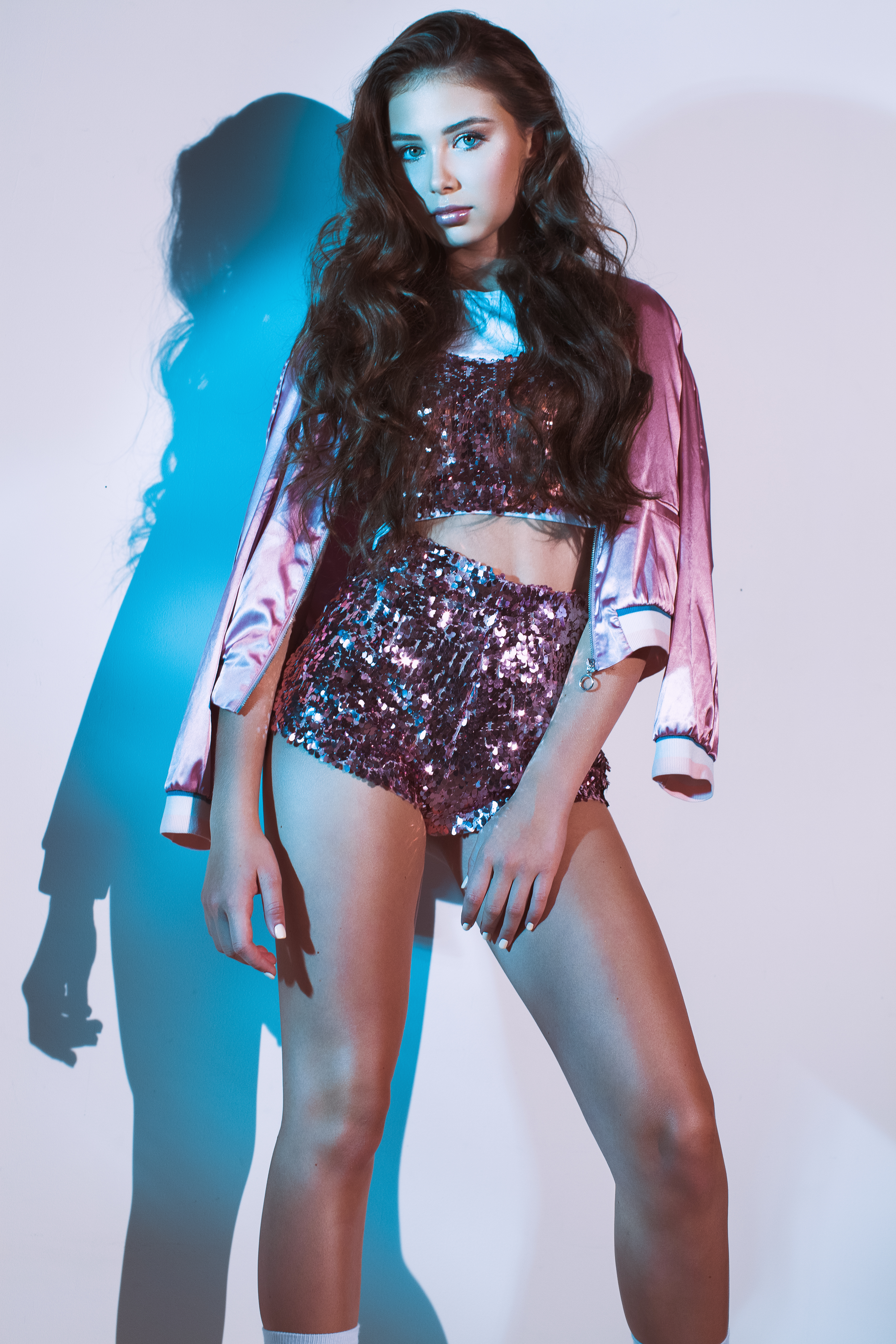 Софія Тарасова